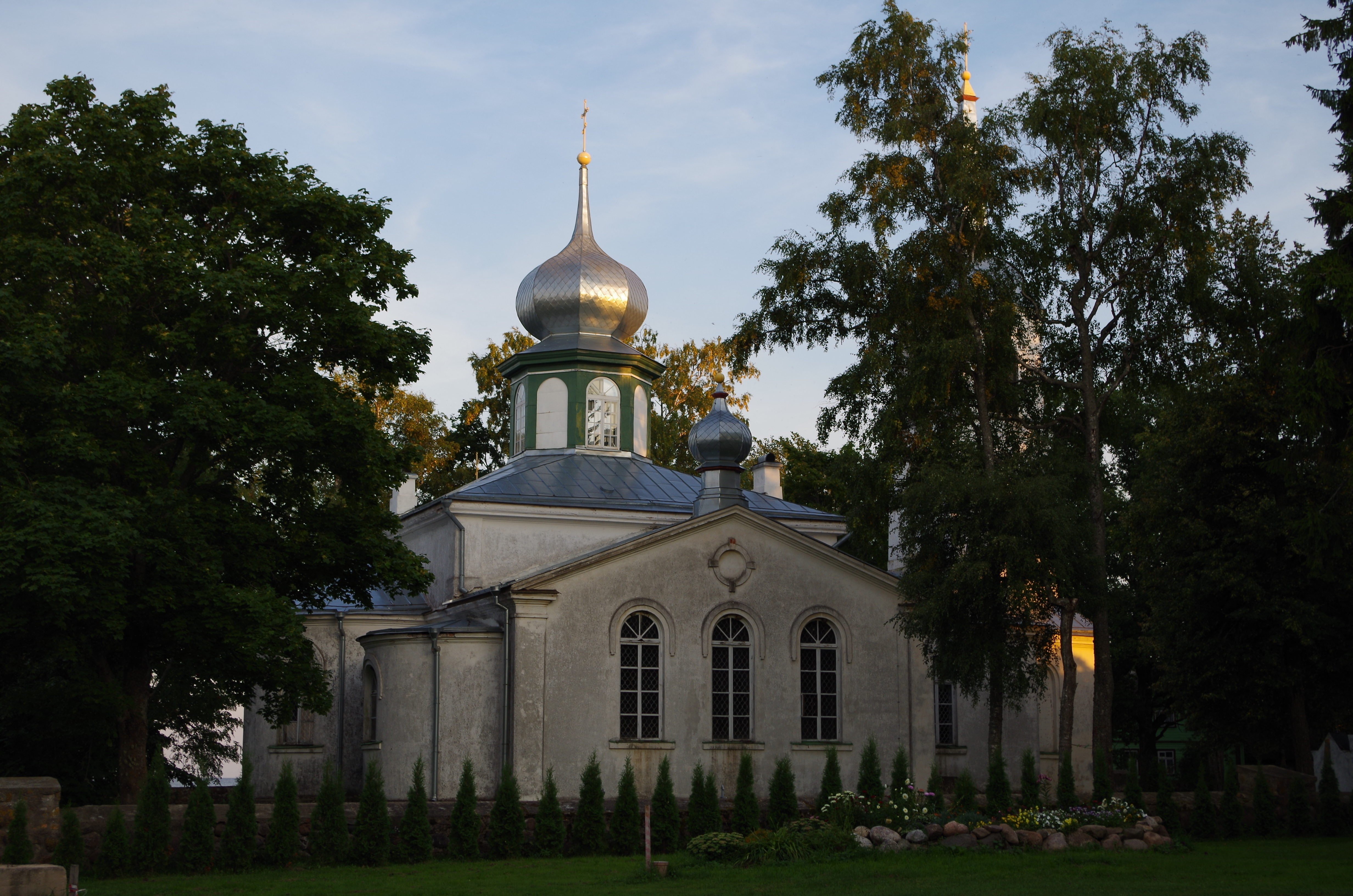 Nina vaatamisväärsusteks on õigeusu Jumalaema Kaitsmise kirik (ehitatud 1827-1828, suurendati ristikujuliseks 1908) ning tuletorn (ehitatud 1936). Samuti kalevipoja sillaehitusest jäänud "kivikülv", millest tuleb ka paiga nimetus. Kiviid on ilmselt siia kantud kokkulükatud rüsijää poolt, mis on kevadeti jäämineku ajal vaatamisväärsus omaette.